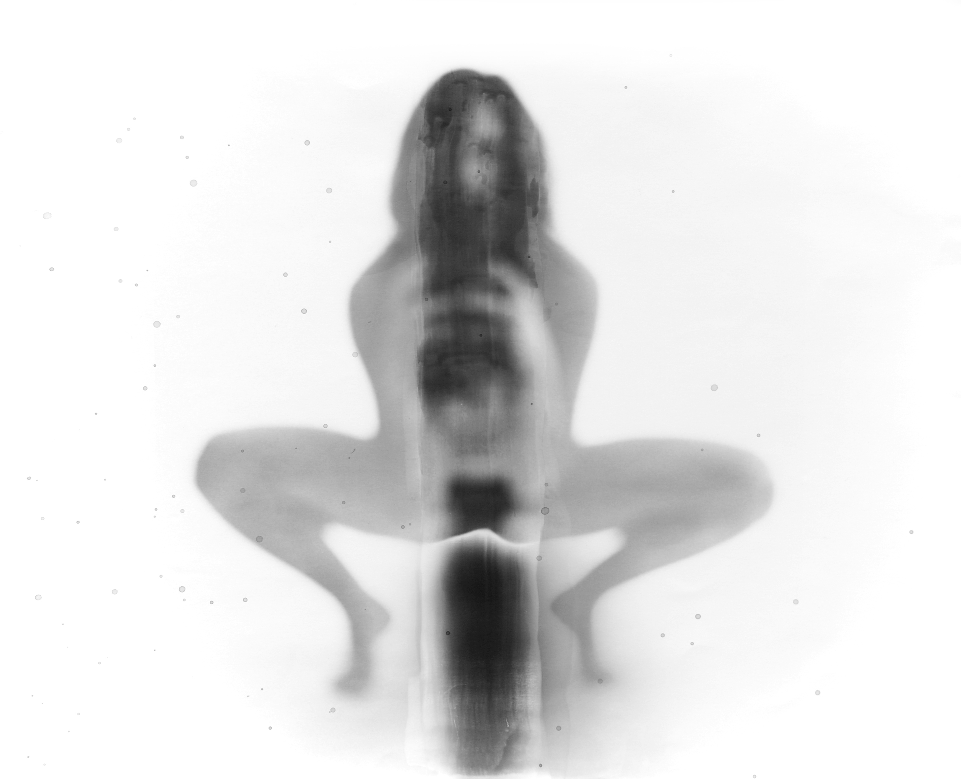 Selbstporträt Studie der Fotokünstlerin Valentina Murabito